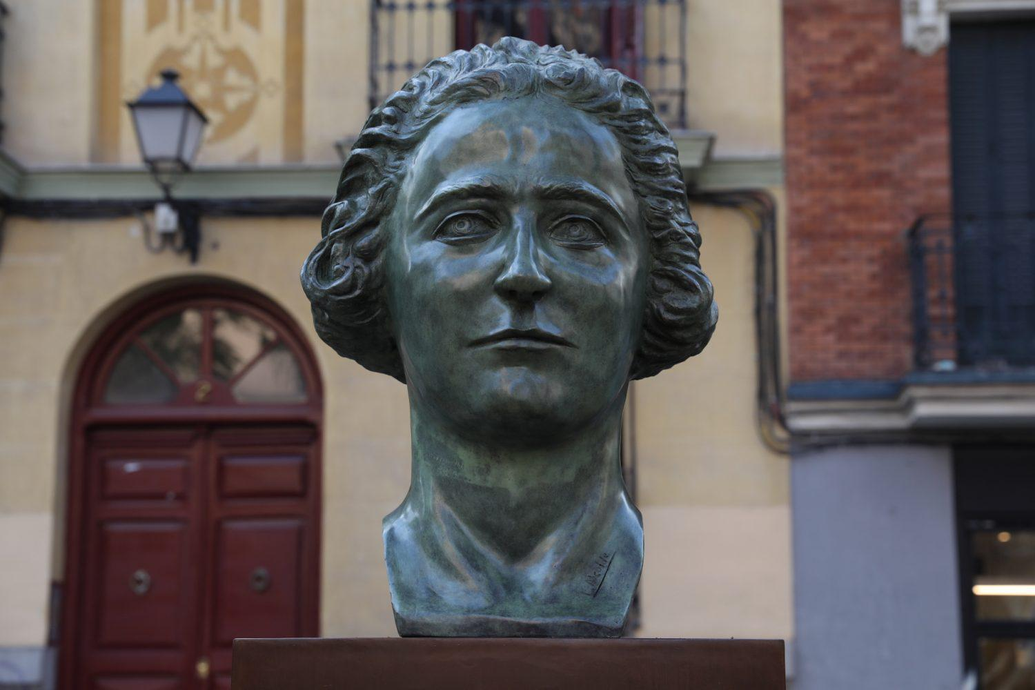 El busto de la abogada y artífice de la consecución de voto femenino Clara Campoamor ha vuelto al espacio que durante 10 años ocupó en la plaza de los Guardias de Corps, situada frente al Centro Cultural Conde Duque. La escultura fue robada en la madrugada del 28 de julio de 2016. Por razones artísticas y sociales, el Ayuntamiento de Madrid tomó la decisión de reponer en su lugar el busto robado, encomendando su ejecución al mismo artista que realizó la escultura original en 2006, atendiendo a motivos artísticos y de derecho de exclusividad.